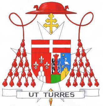 Stemma del Cadrinal mario Nasalli Rocca di Corneliano, di Piacenza.